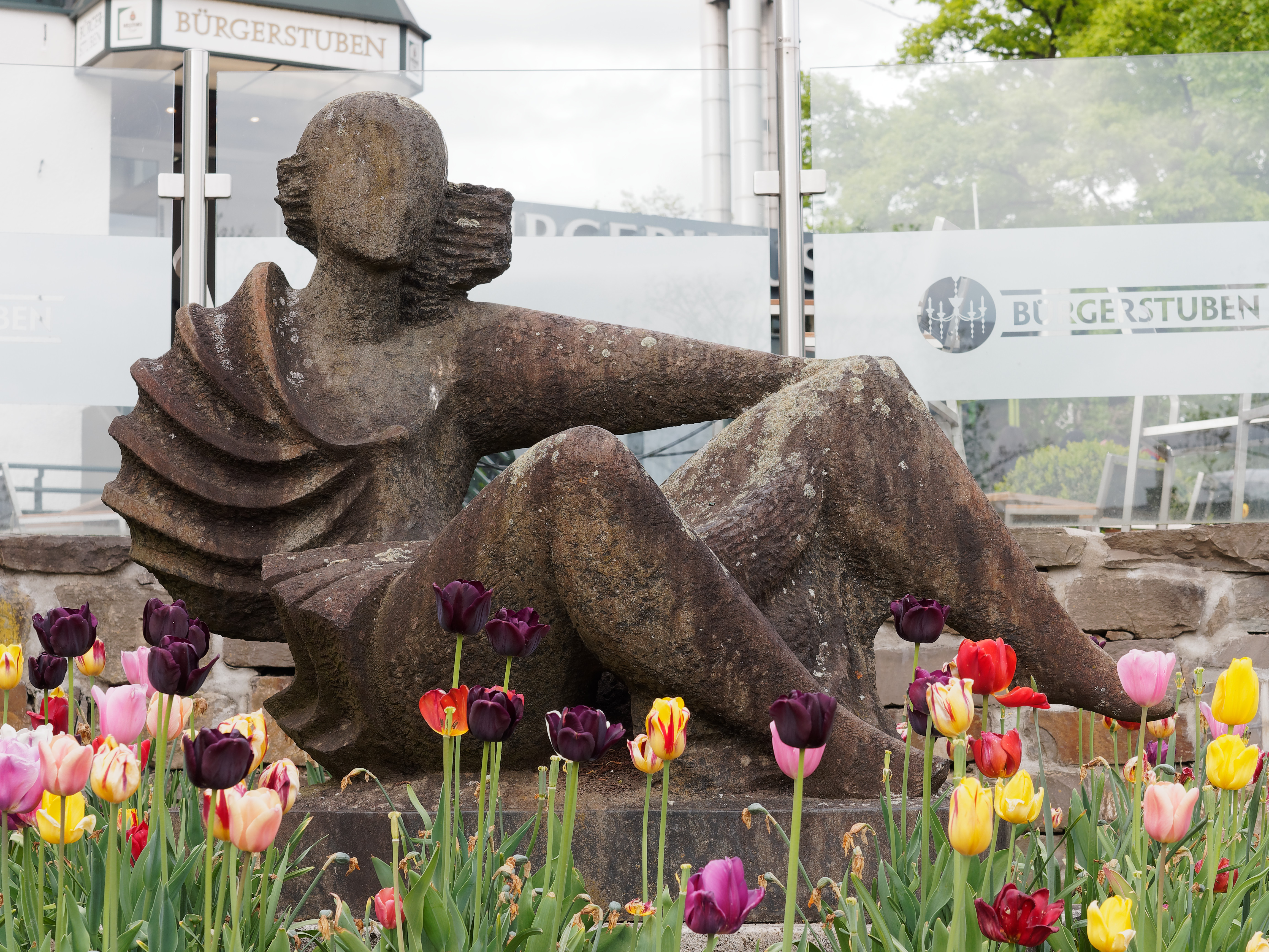 Skulptur "Ruhender Mensch" (1981) aus Diabas von Enrique Asensi Kunst in Wickede (Ruhr)